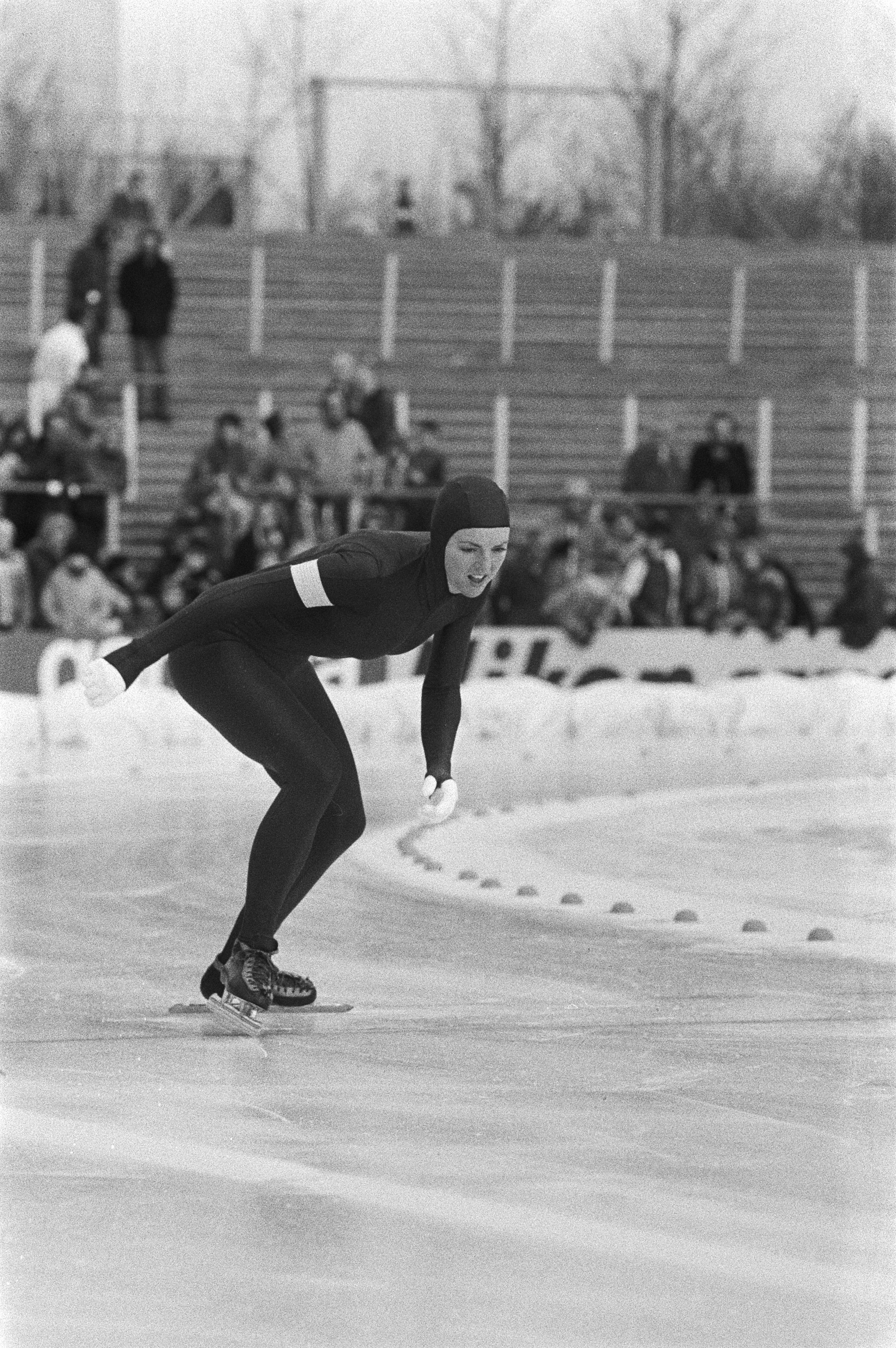 Collectie / Archief : Fotocollectie Anefo Reportage / Serie : [ onbekend ] Beschrijving : Wereldkampioenschappen schaatsen dames allround in Den Haag. Joke van Rijssel in actie. Datum : 3 februari 1979 Locatie : Den Haag, Zuid-Holland Trefwoorden : schaatsen, sport Persoonsnaam : Rijssel, Joke van Fotograaf : Suyk, Koen / Anefo Auteursrechthebbende : Nationaal Archief Materiaalsoort : Negatief (zwart/wit) Nummer archiefinventaris : bekijk toegang 2.24.01.05 Bestanddeelnummer : 930-1067